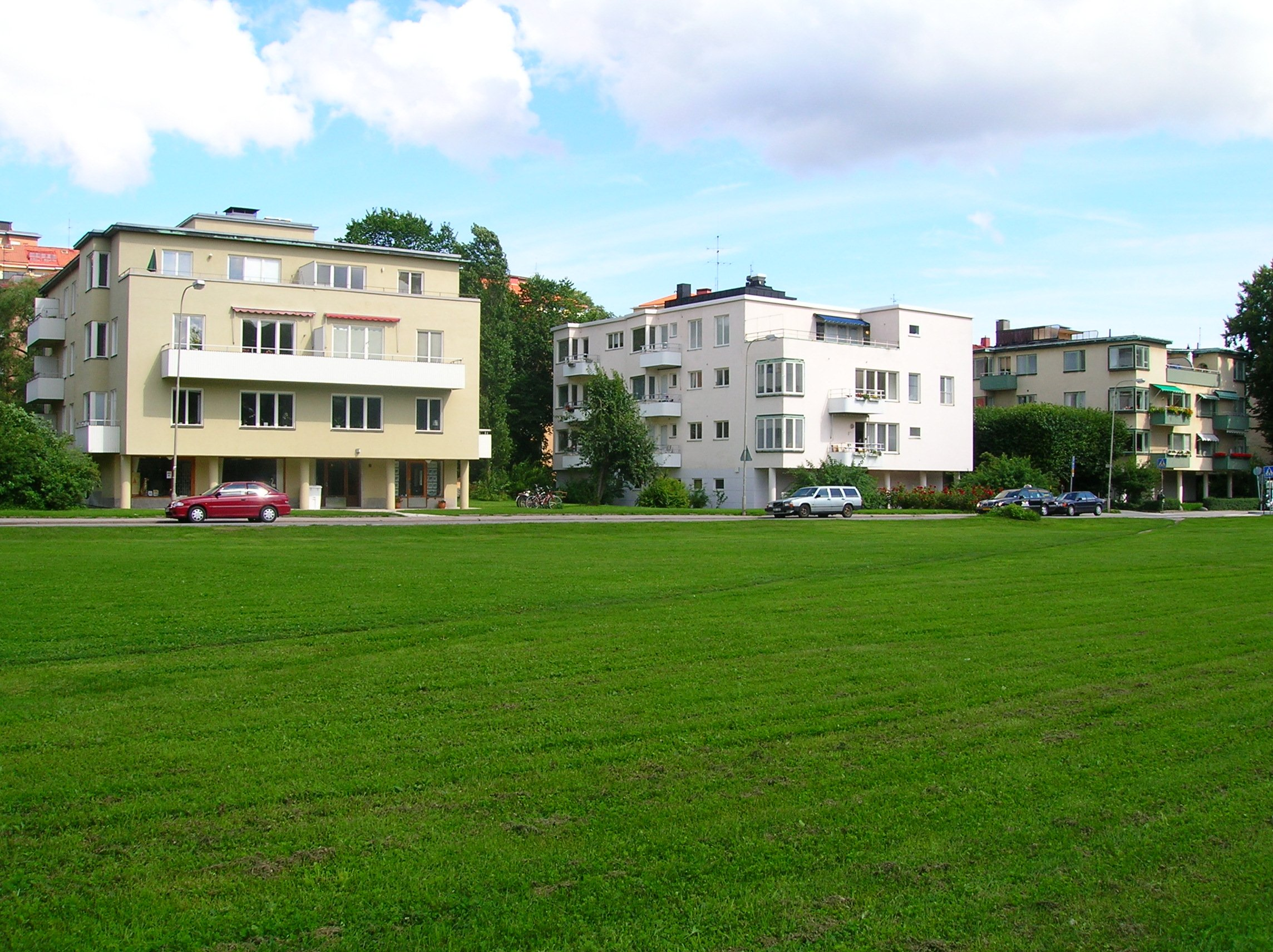 Askrikegatan 11-15, Ladugårdsgärdet, Stockholm Husen uppförda 1937.